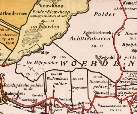 Meijepolder